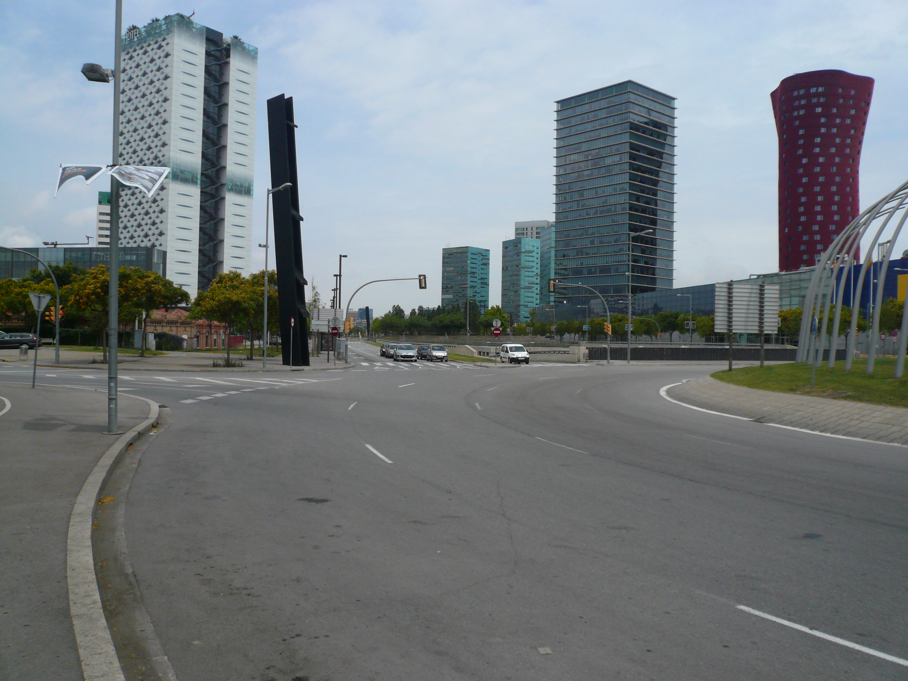 La Granvia de l'Hospitalet. Fotografia des del costat muntanya.